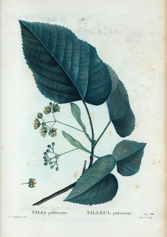 Tilia pubescens = Tilleul pubescent